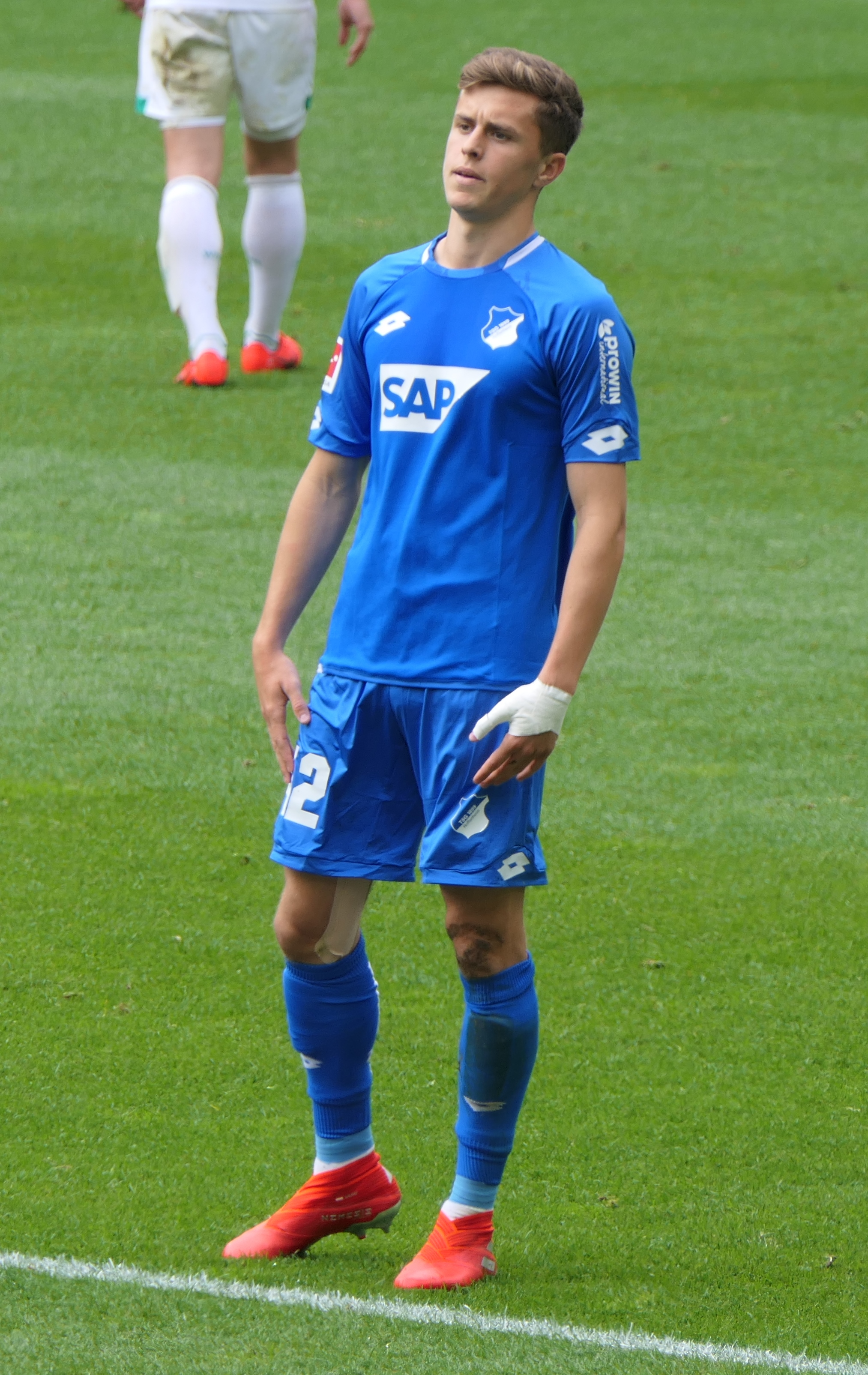 Der Fussballprofi Christoph Baumgartner im Trikot der TSG 1899 Hoffenheim beim Heimspiel gegen den SV Werder Bremen am 11.05.2019.